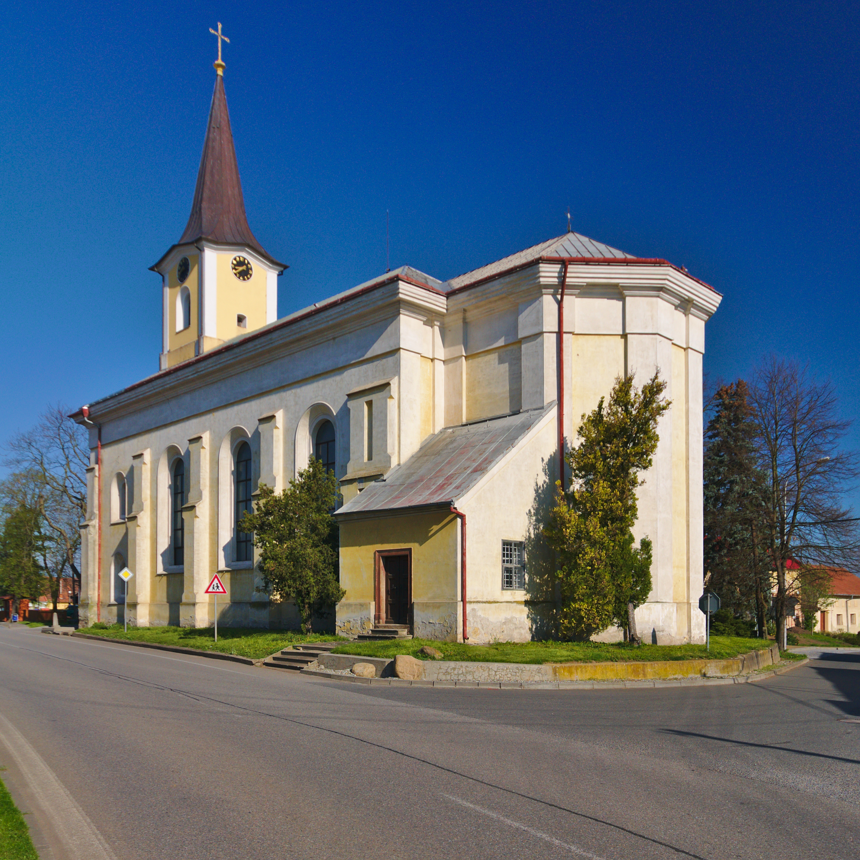 Kostel svatého Michaela, Vrchoslavice, okres Prostějov